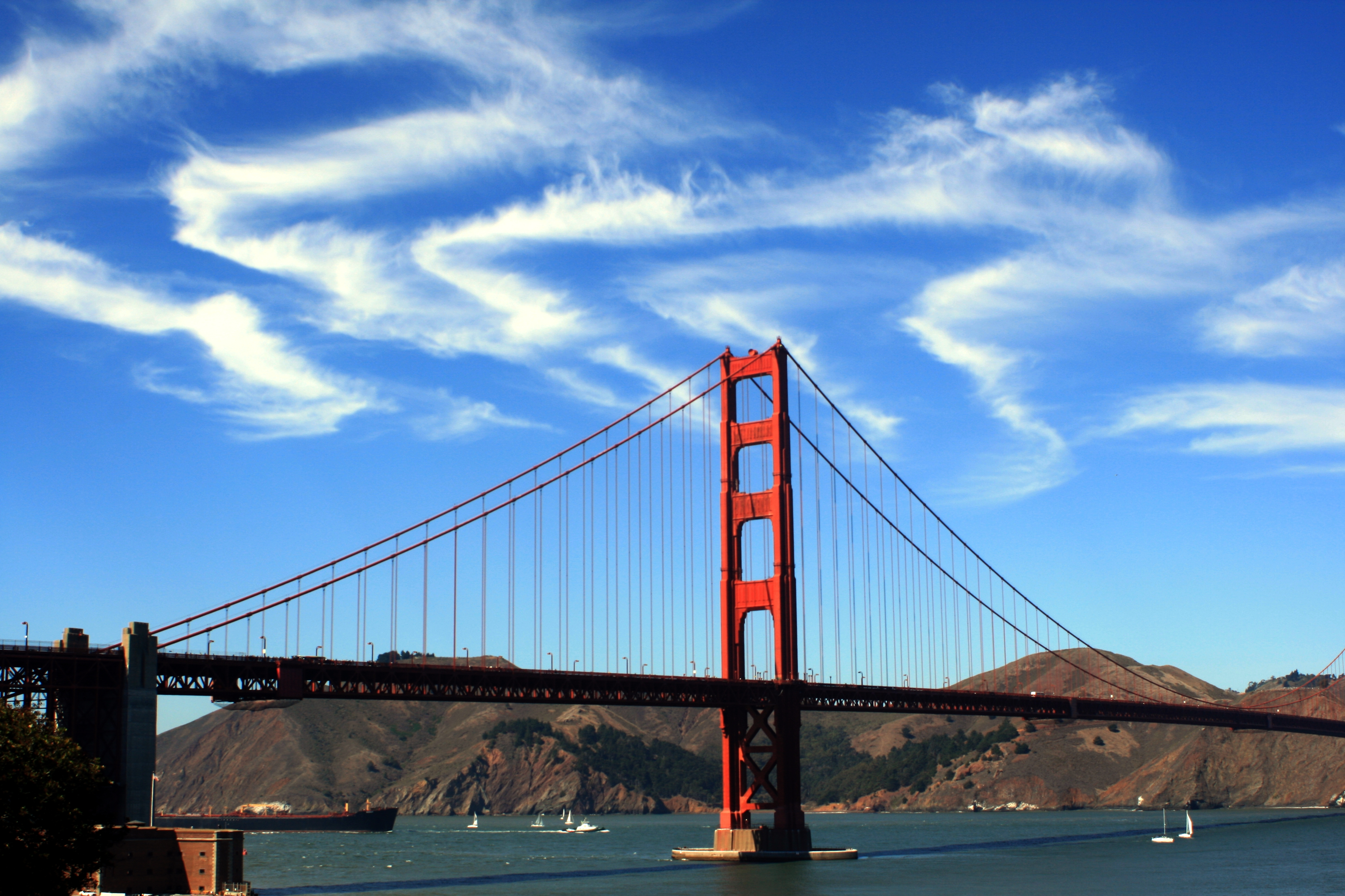 Cirrus Clouds over Golden Gate Bridge